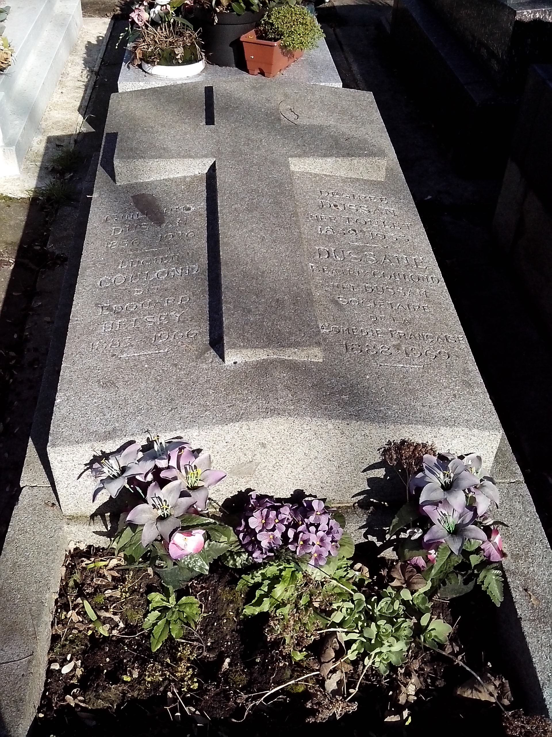 Vue d'ensemble